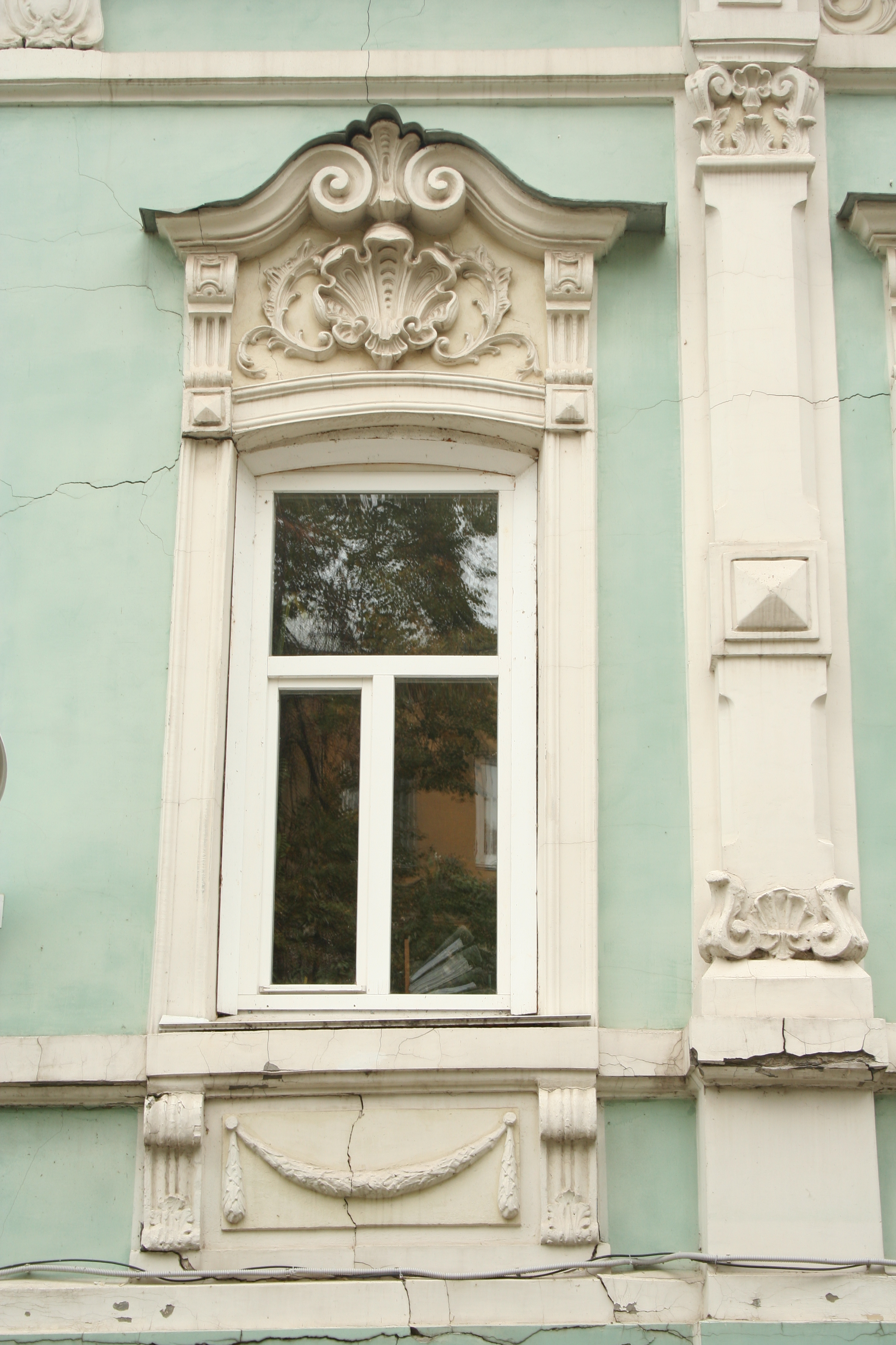 Жилой дом усадьбы (Нижегородская область, Нижний Новгород, Ильинская улица, 18)